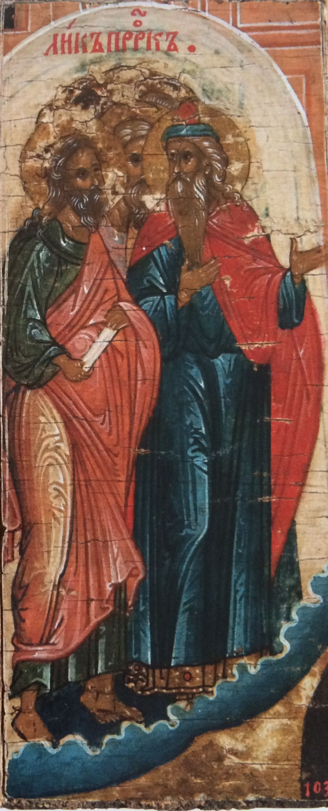 Лик пророков (фрагмент иконы "Страшный суд"). Новгород, 1540-е. Происходит из Рождественского монастыря